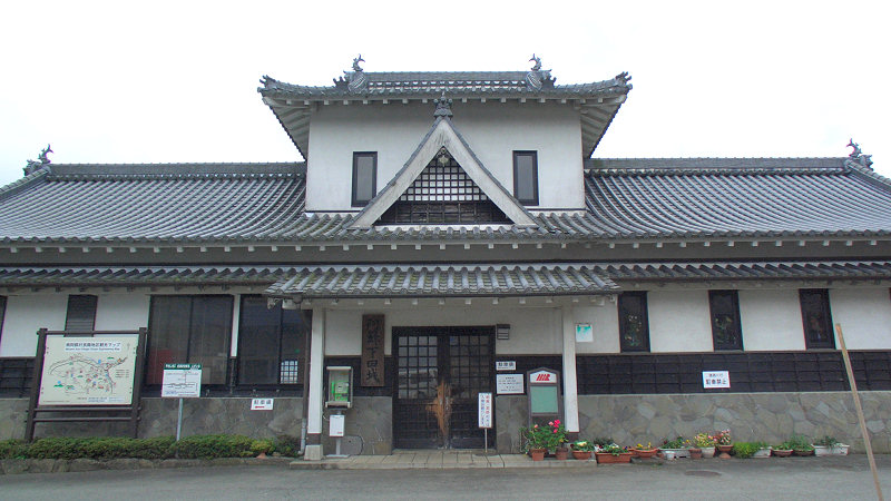 南阿蘇鉄道 阿蘇下田城ふれあい温泉駅 広角レンズで撮影していますが、駅前が狭いため全景が収まっていません。 撮影者/著作者/著作権保有者 : MK Products (本人がアップロード) 撮影日 : 2006/11/21 阿蘇下田城ふれあい温泉駅用にアップロードした画像です。良い画像があれば別の画像に変えてください。